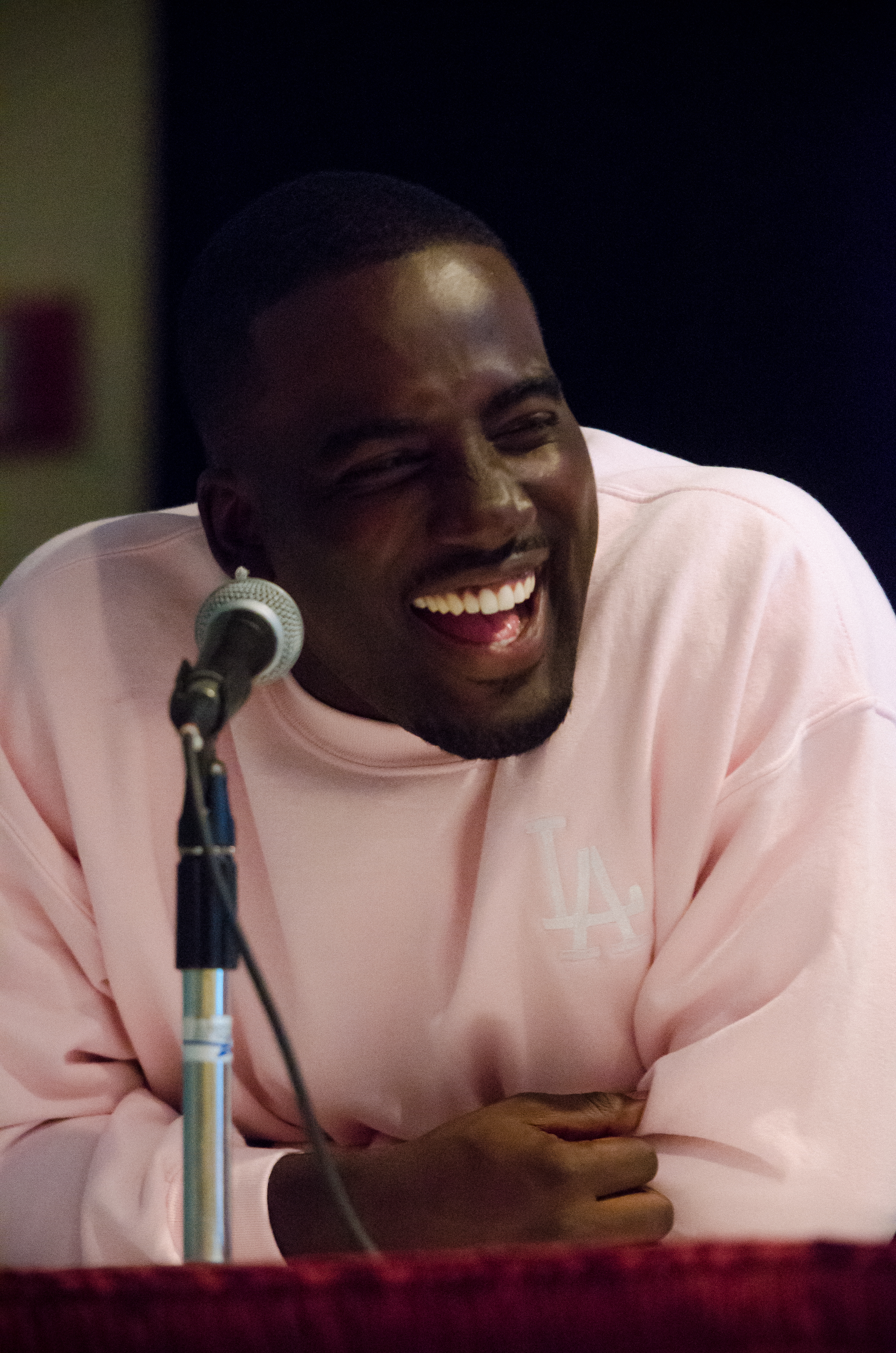 Deep Laughter